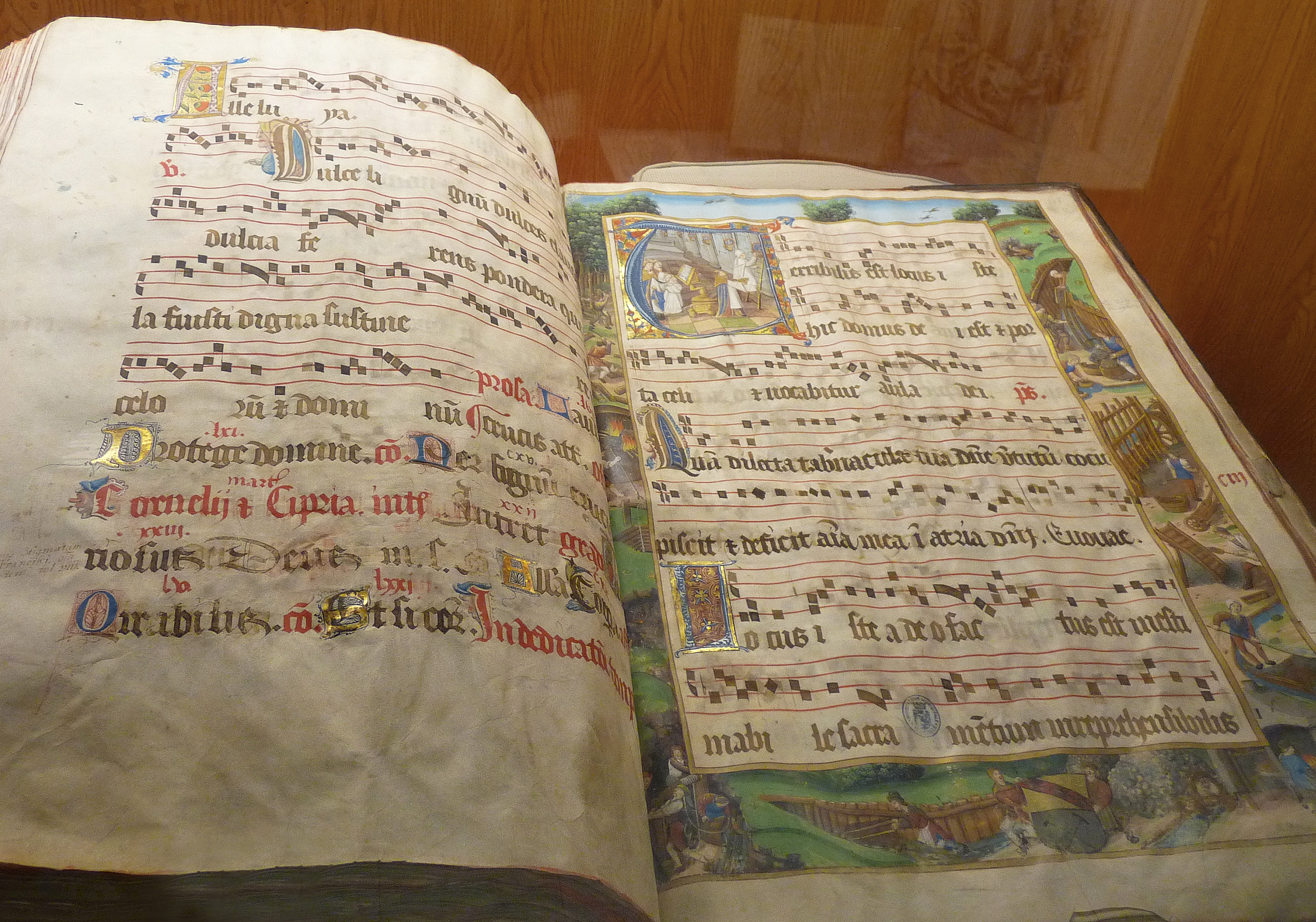 Graduel de la collégiale de Saint-Dié, fin du 15e-début du 16e s., manuscrit sur velin, 750 x 540 mm. Appartenait au chapitre de Saint-Dié et provient des confiscations révolutionnaires. Conservé dans la salle du Trésor de la Médiathèque Victor-Hugo de Saint-Dié-des-Vosges